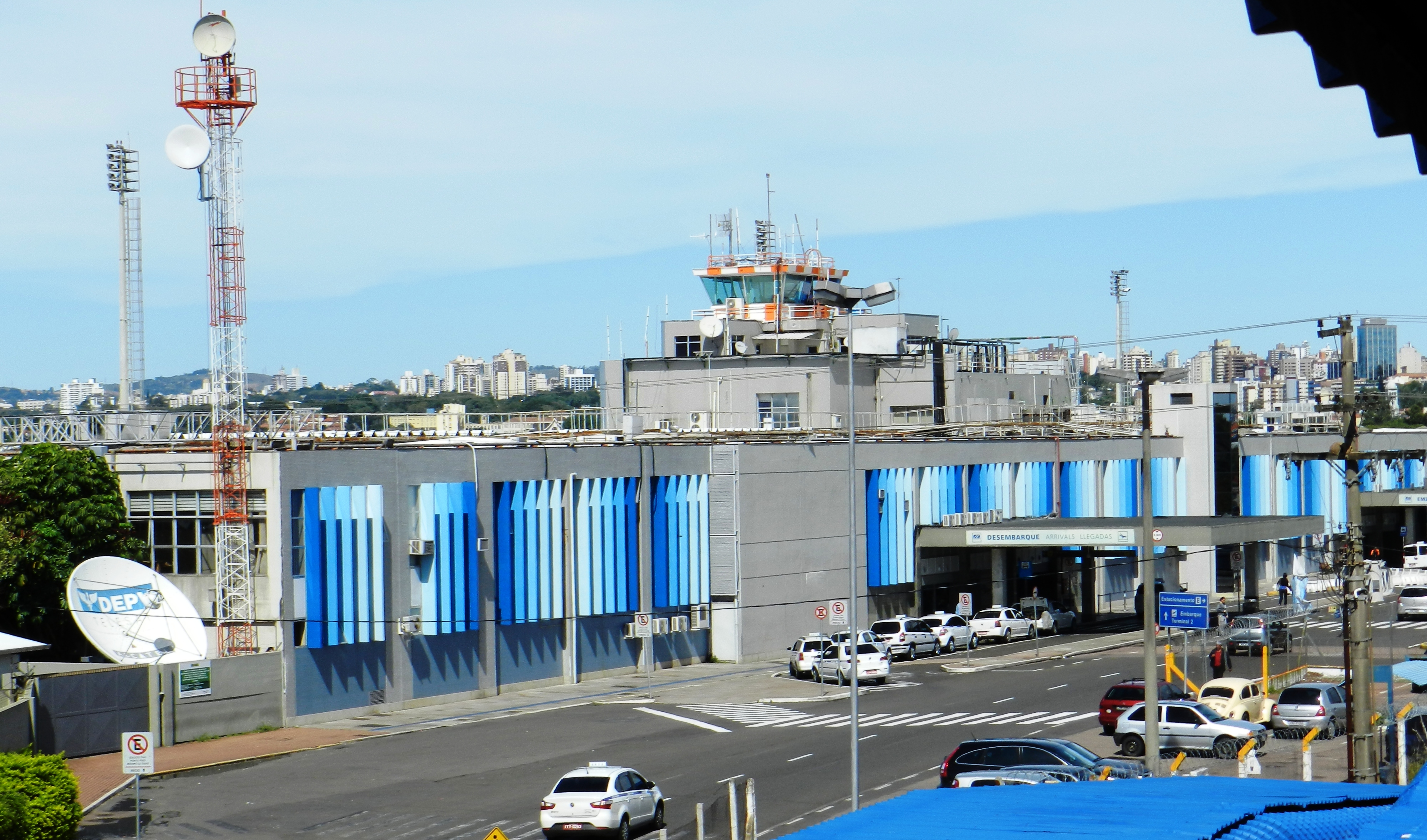 Aeroporto 2 Salgado Filho